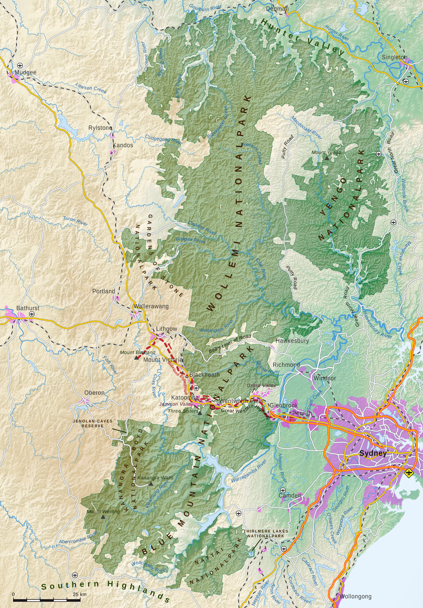 Blue Mountains Weltnaturerbe